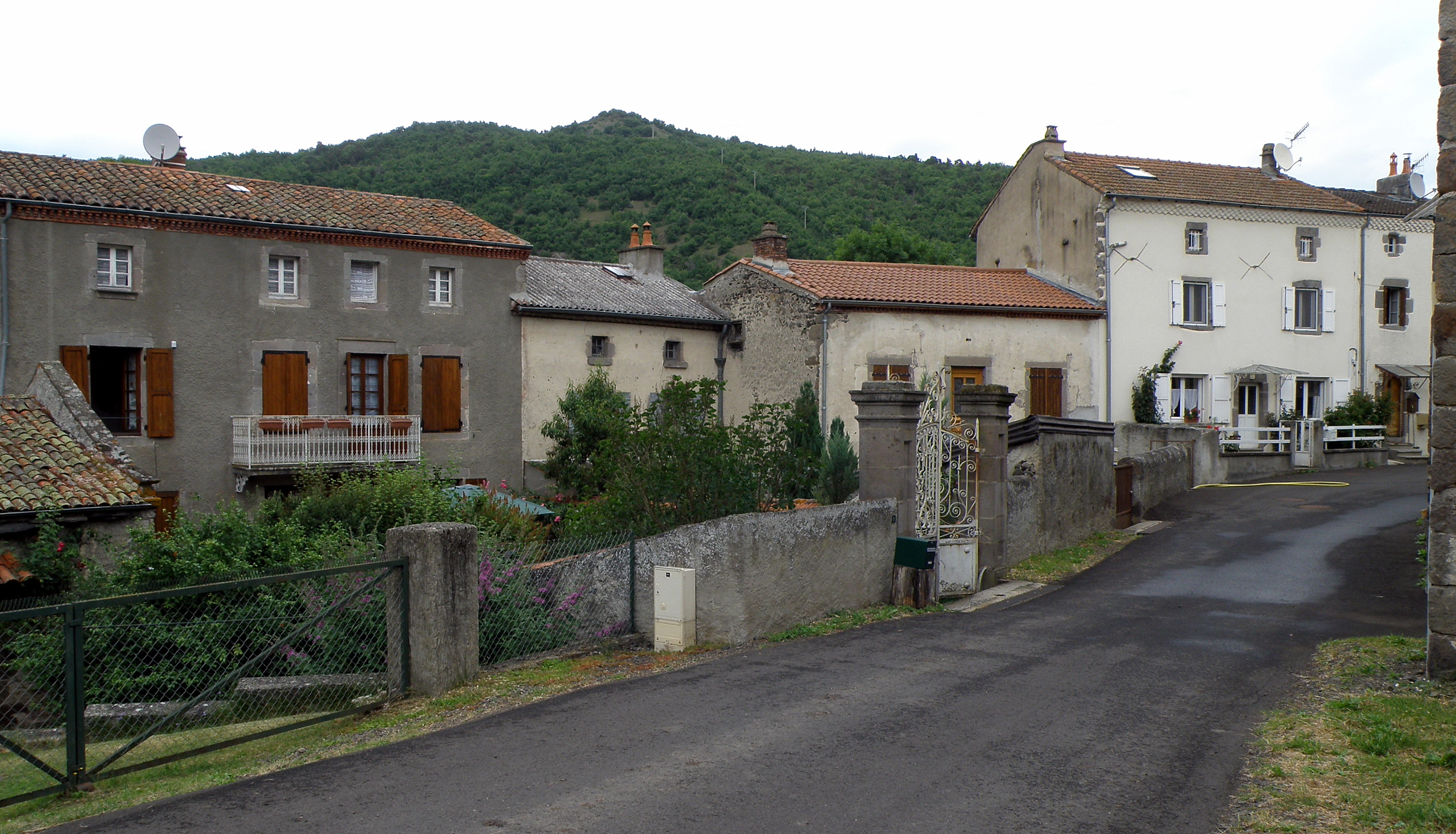 Verrières, comm. du Puy-de-Dôme (Auvergne, France). Aspect du bourg (rue de la Charbonnière) ; à l'arrière-plan, au centre, puy Tomba (alt. 819m). Coup d'œil vers le nord-est.